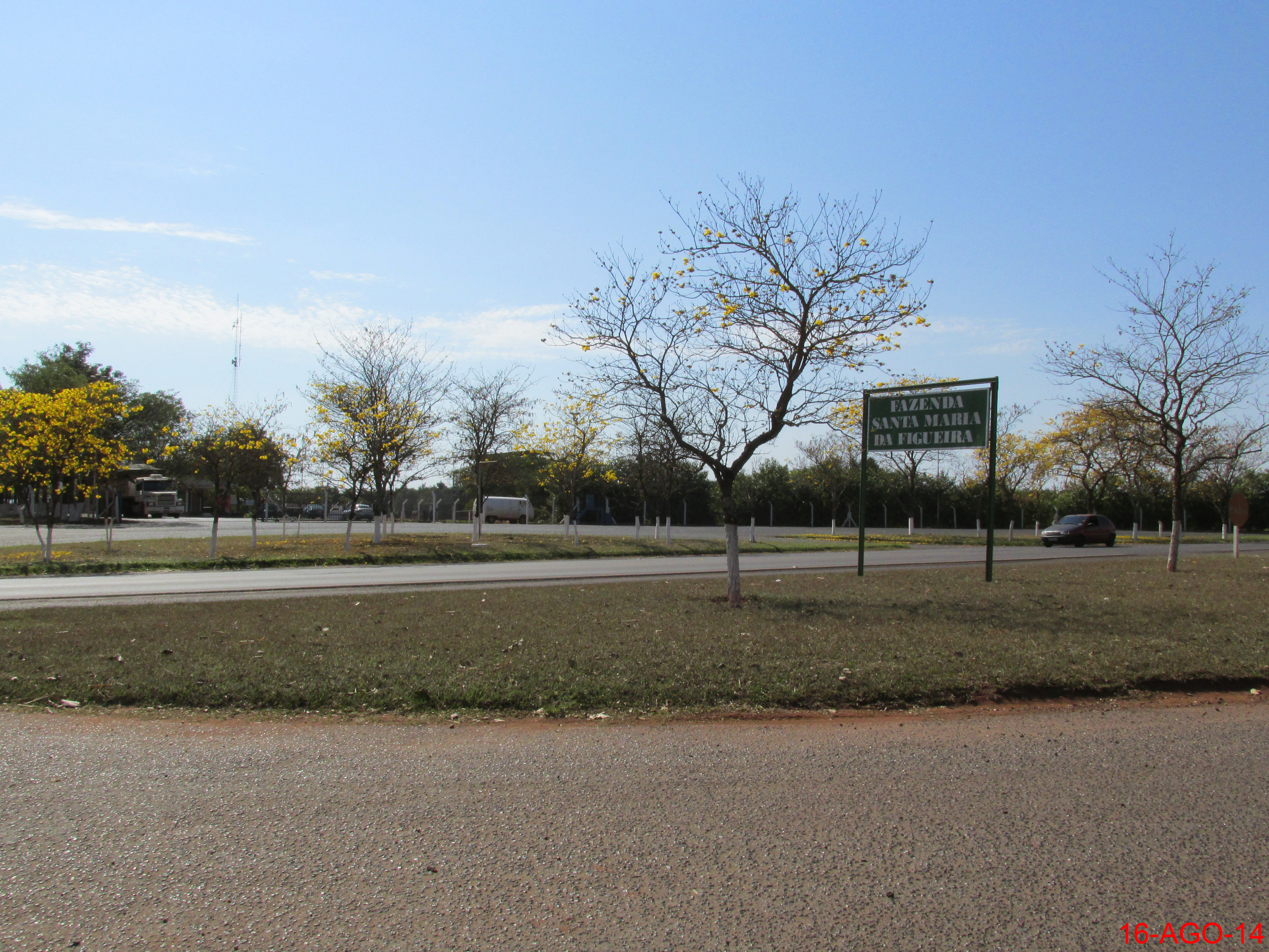 Ipê amarelo (Tabebuia chrysotricha) na entrada da Fazenda Santa Maria da Figueira, produtora de laranja na rodovia vicinal Francisco Malzoni que liga as cidades de Rincão a Motuca.